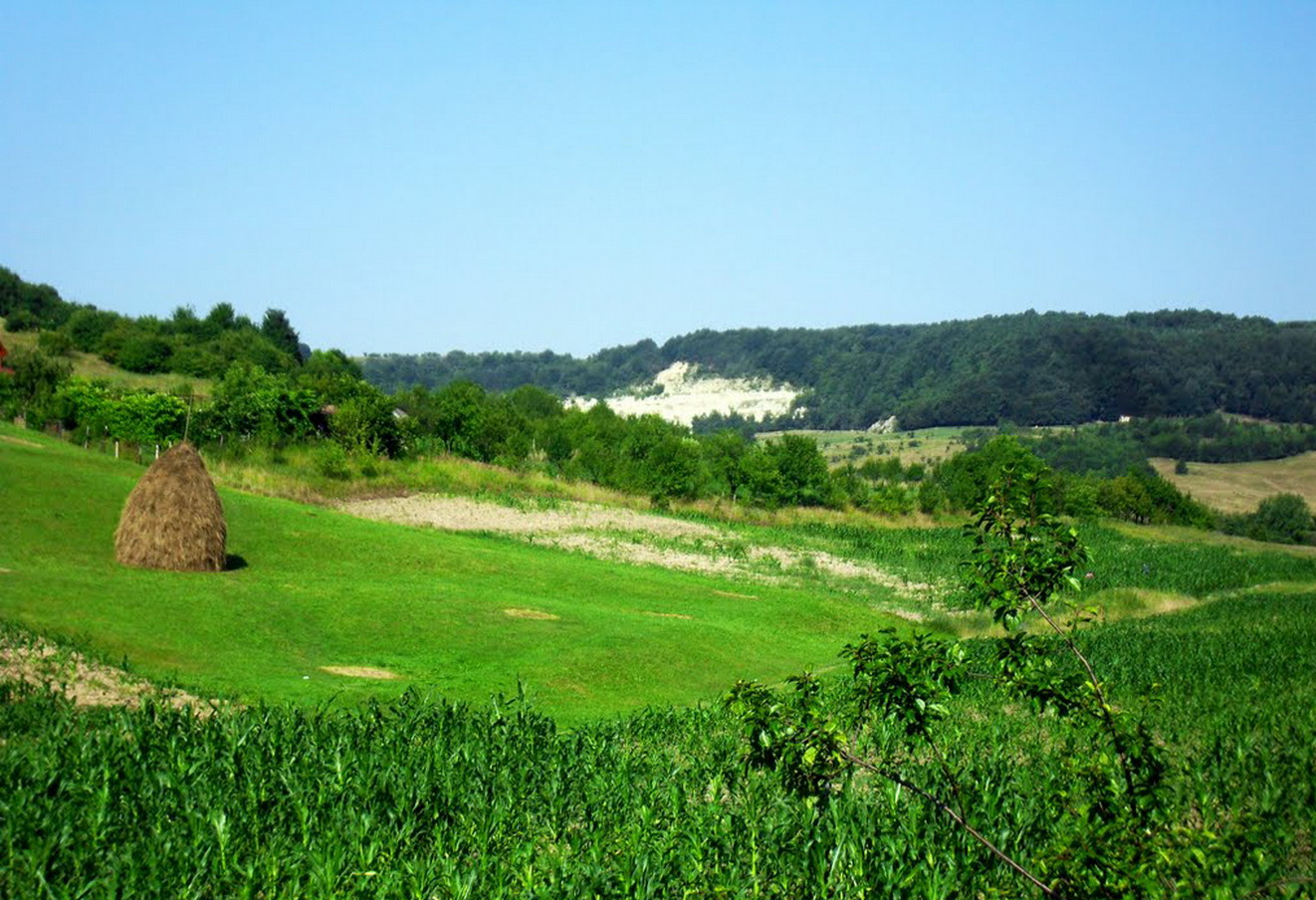 Afloriment